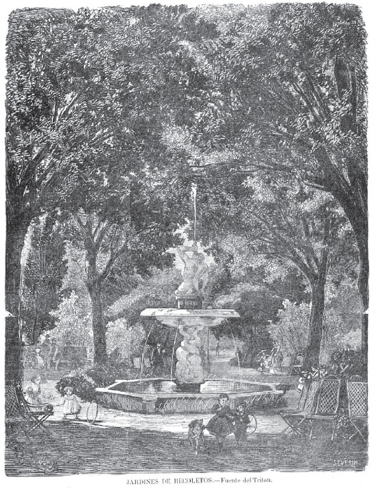 Fuente del Tritón Jardines de Recoletos, Madrid, España, año 1869.